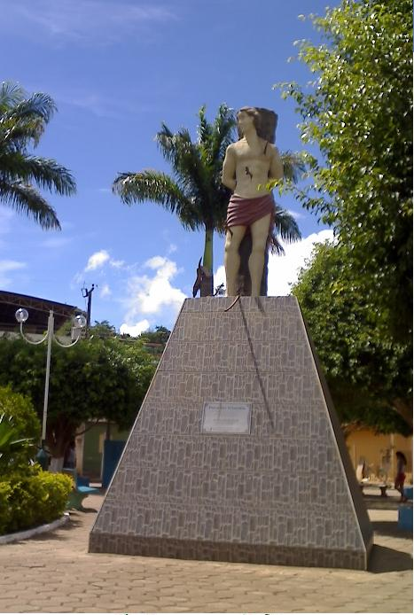 Estatua de São Sebastião na praça João Barbosa Neto no centro de São Sebastiao do Anta